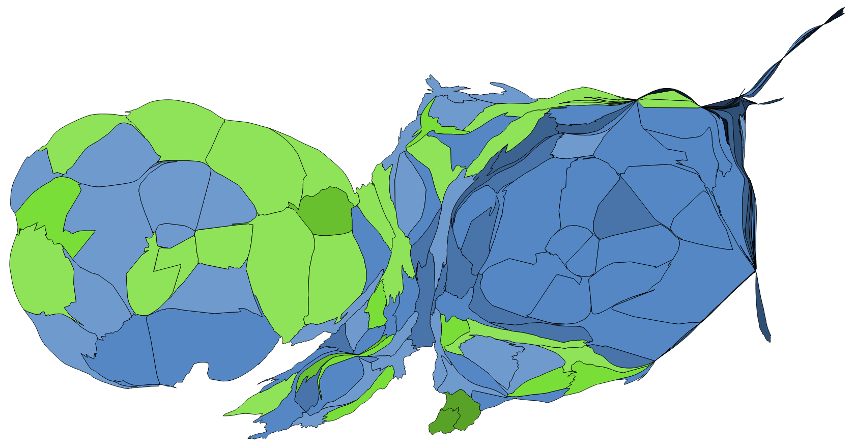 中文（台灣）: 顏色對照表